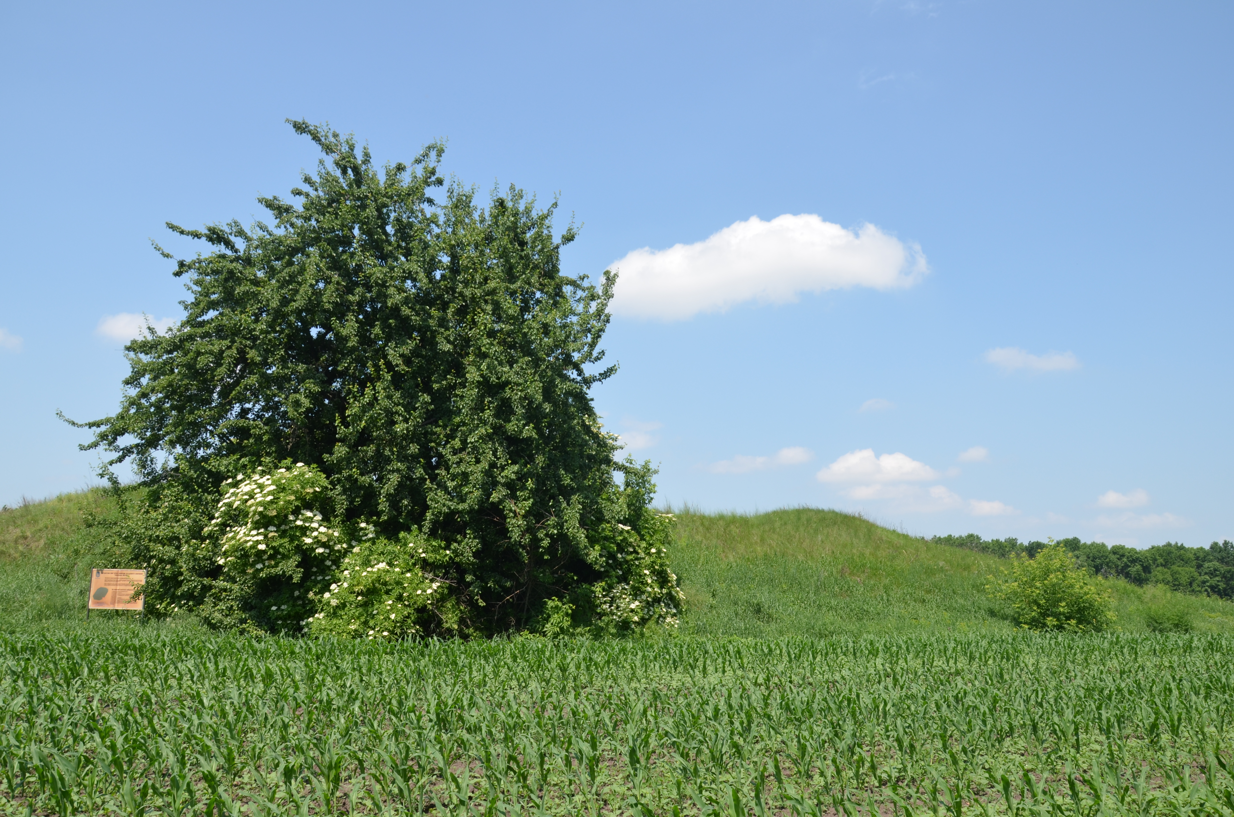 Роблена могила, Переяслав-Хмельницький район, Козлівська сільська рада